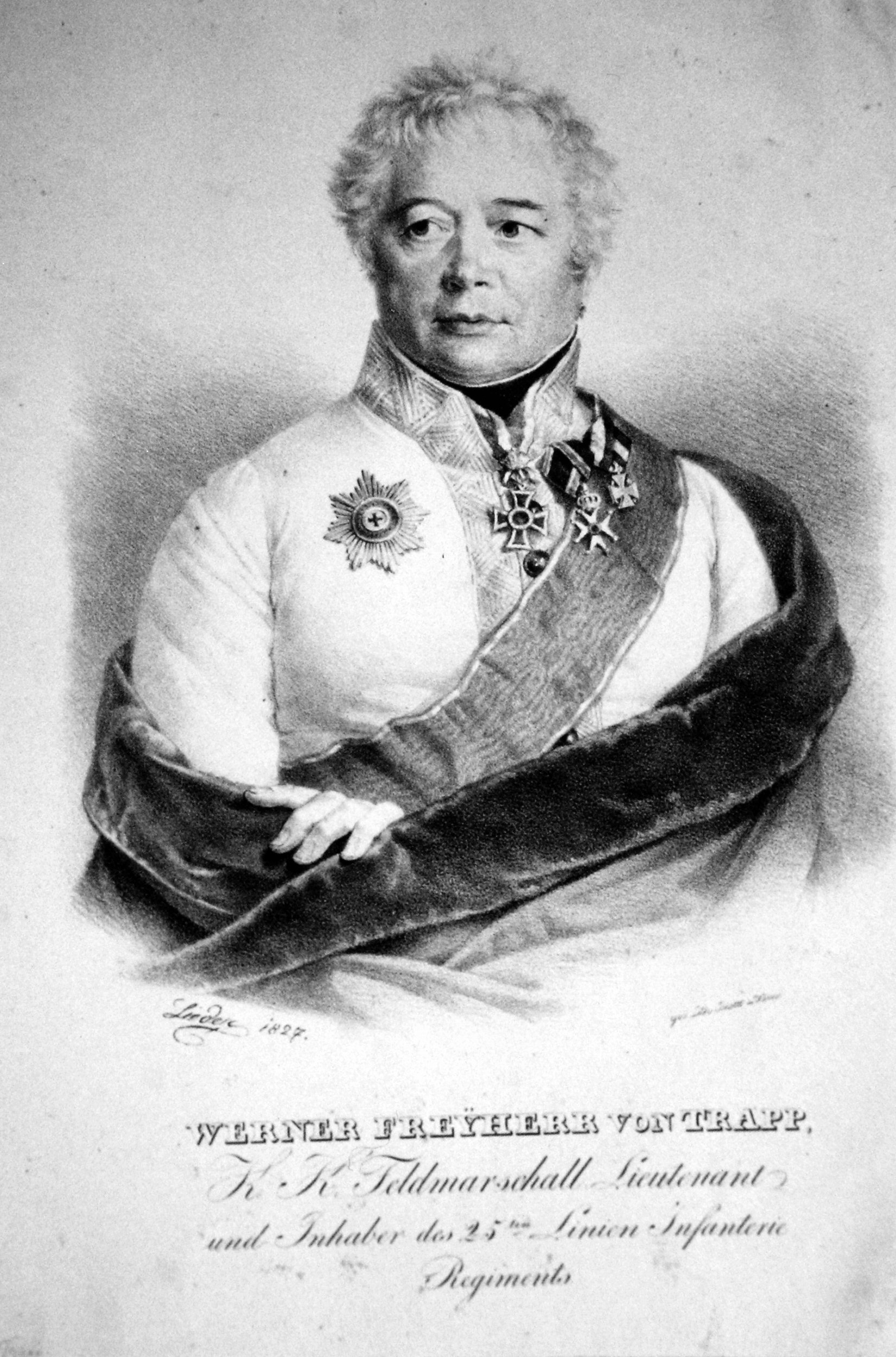 Werner Freiherr von Trapp (1773-1842), k. k. Feldzeugmeister. Lithographie von Friedrich Lieder, 1827